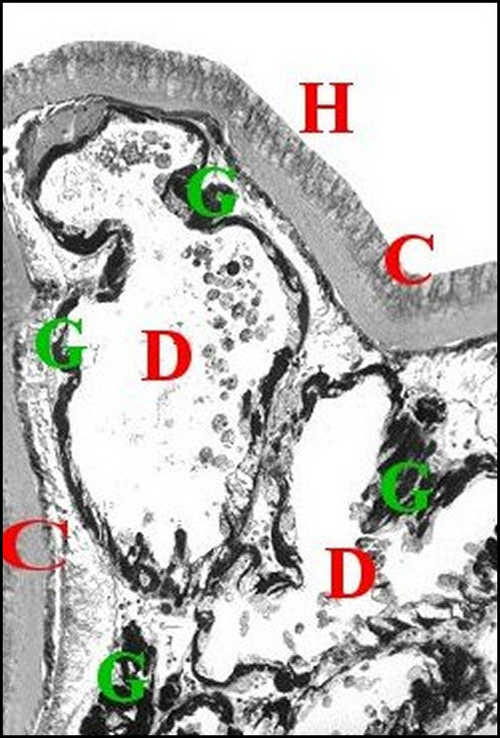 Mastophora cornigera, femelle adulte : coupe histologique transversale du prosoma montrant les détails d'une corne.